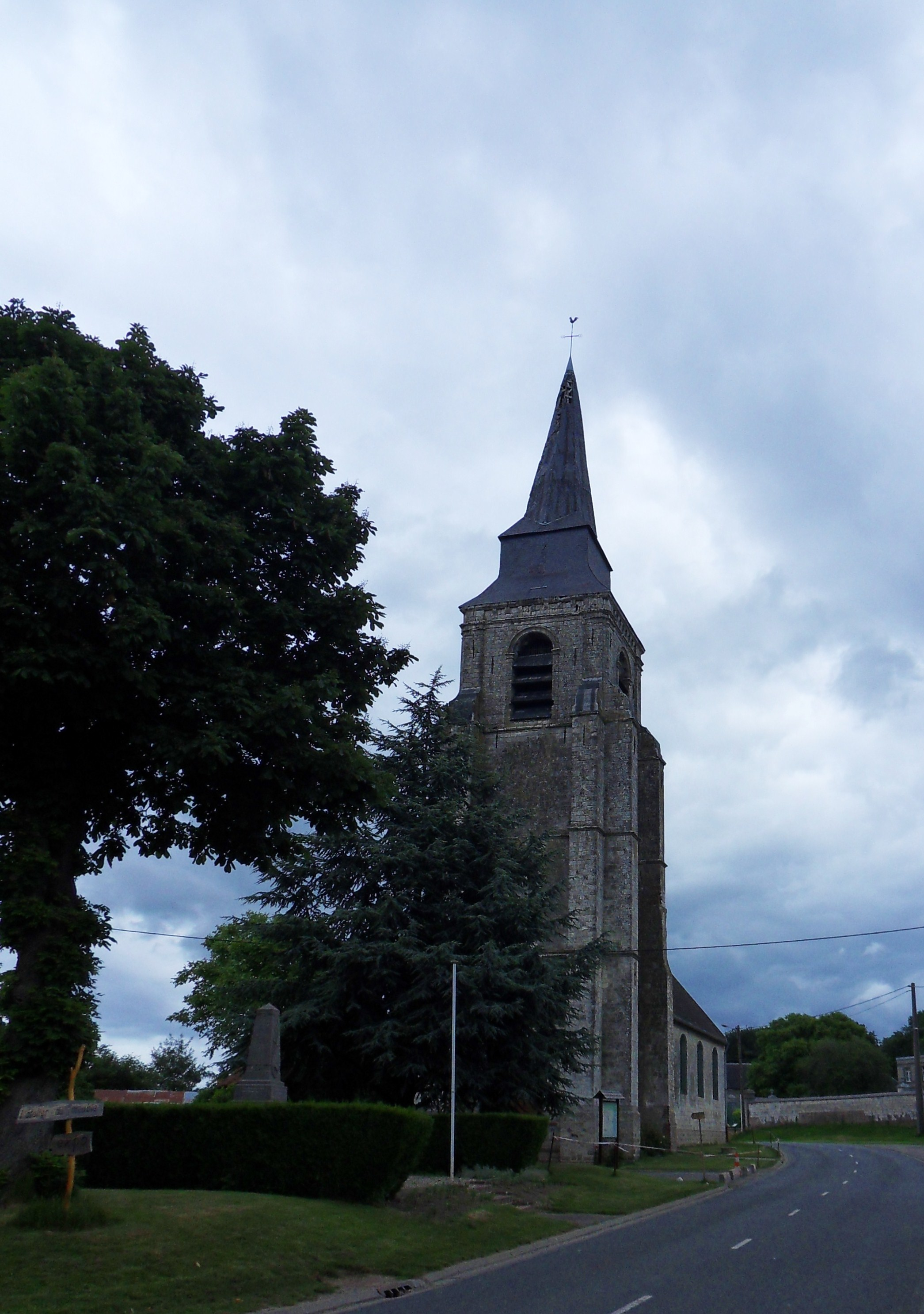 église Saint-Vaast de Bavincourt.